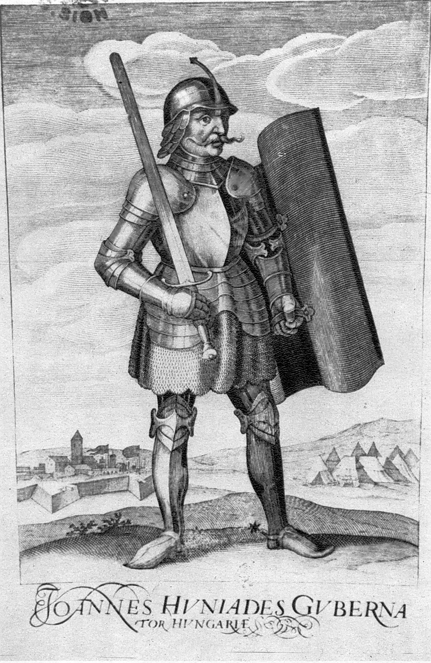 John Hunyadi, contemp. engraving